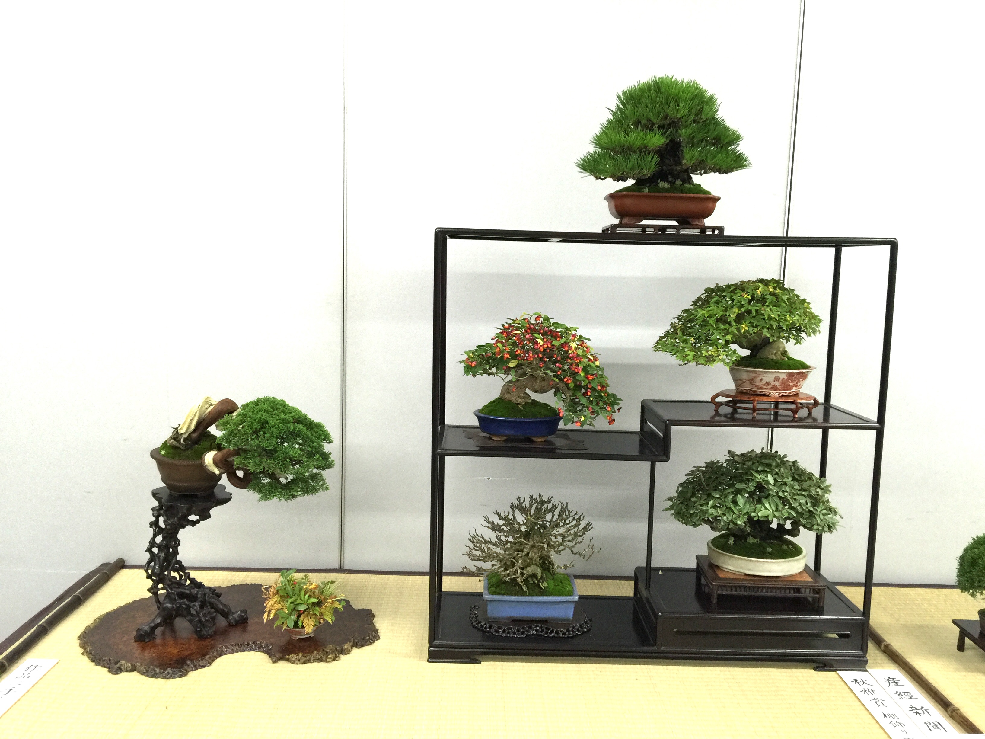 小品盆栽 受賞作品